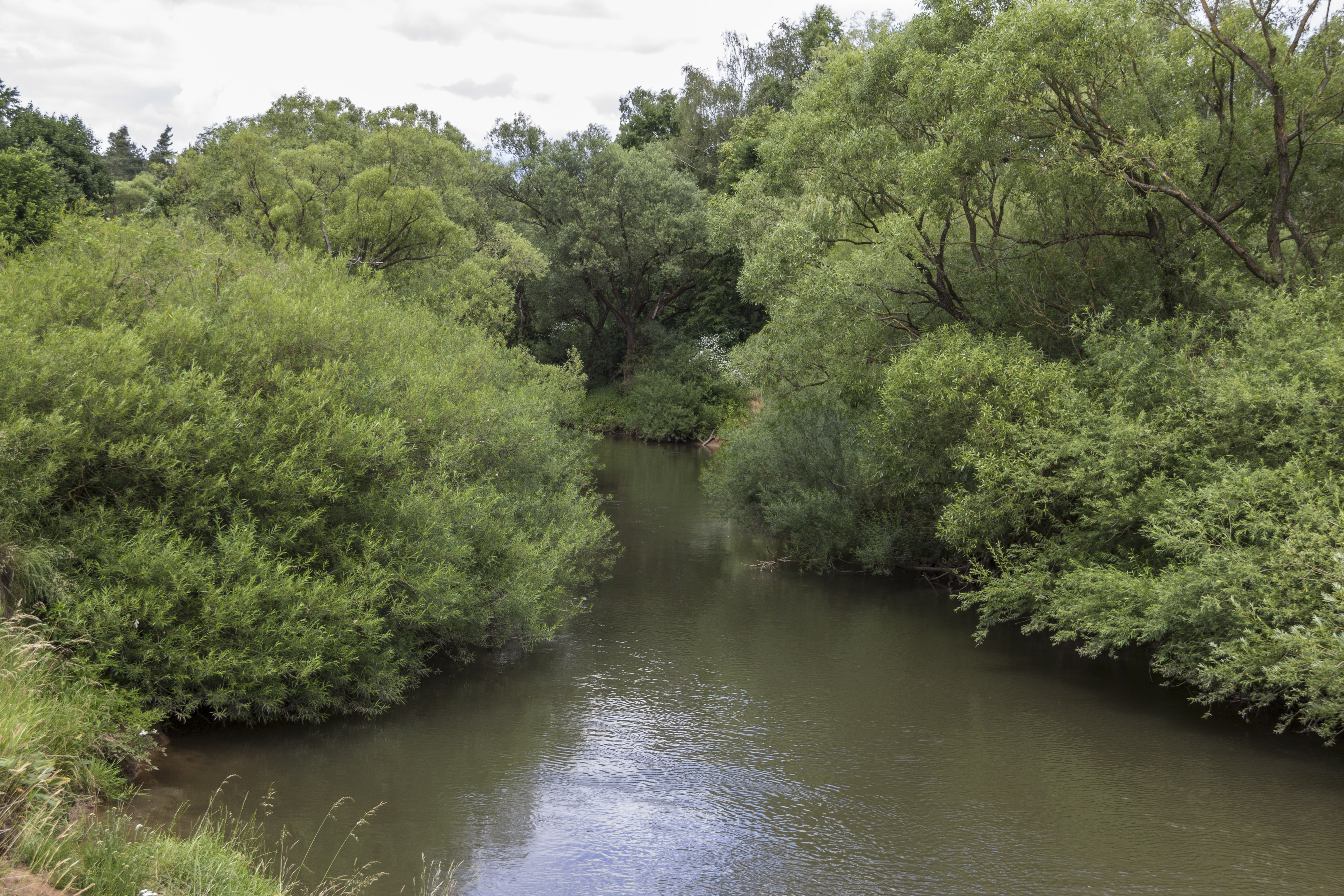 Landschaftsschutzgebiet, Pegnitzaue, Schwaig